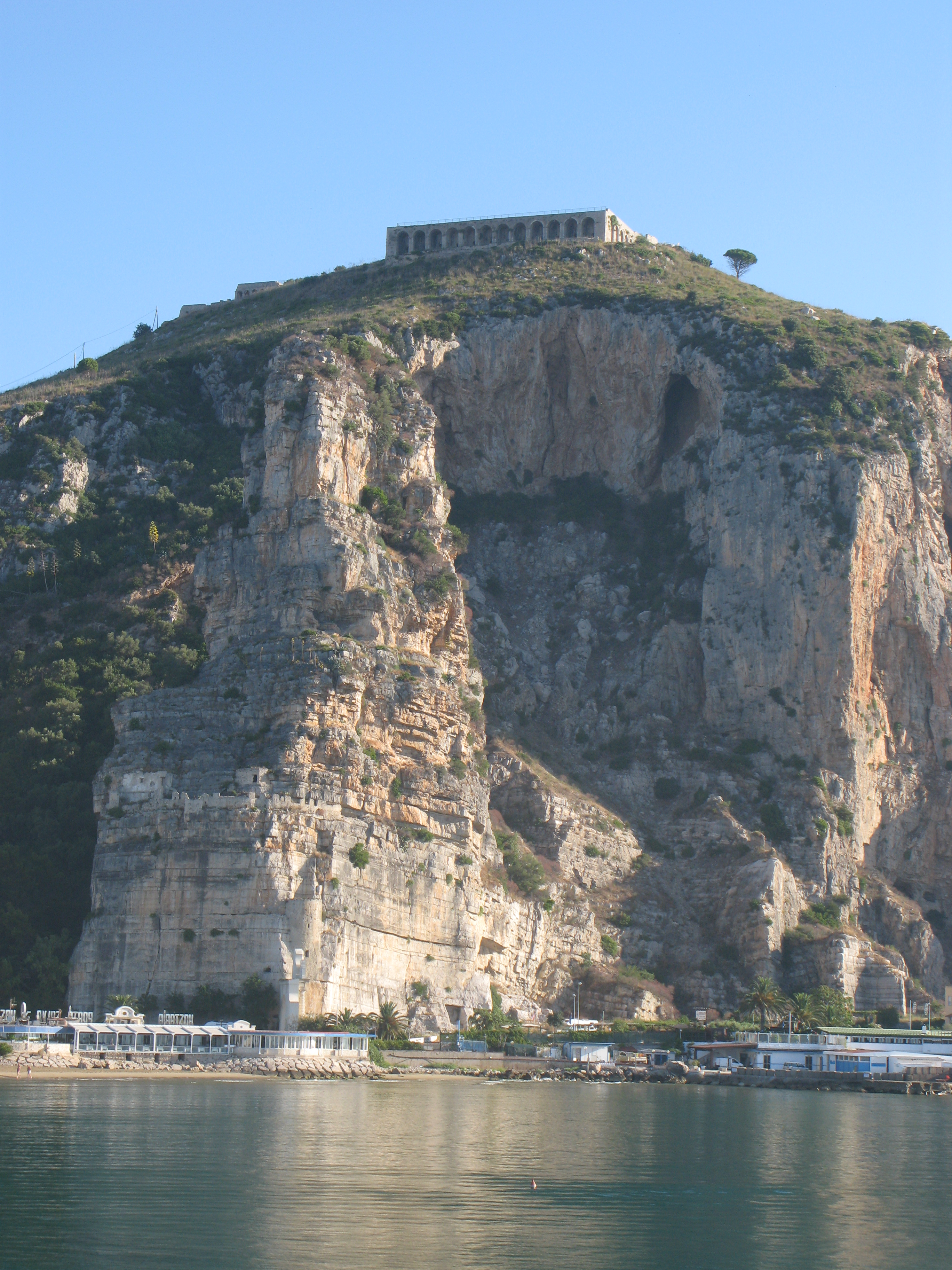 Tempio di Giove Anxur visto dal Porto